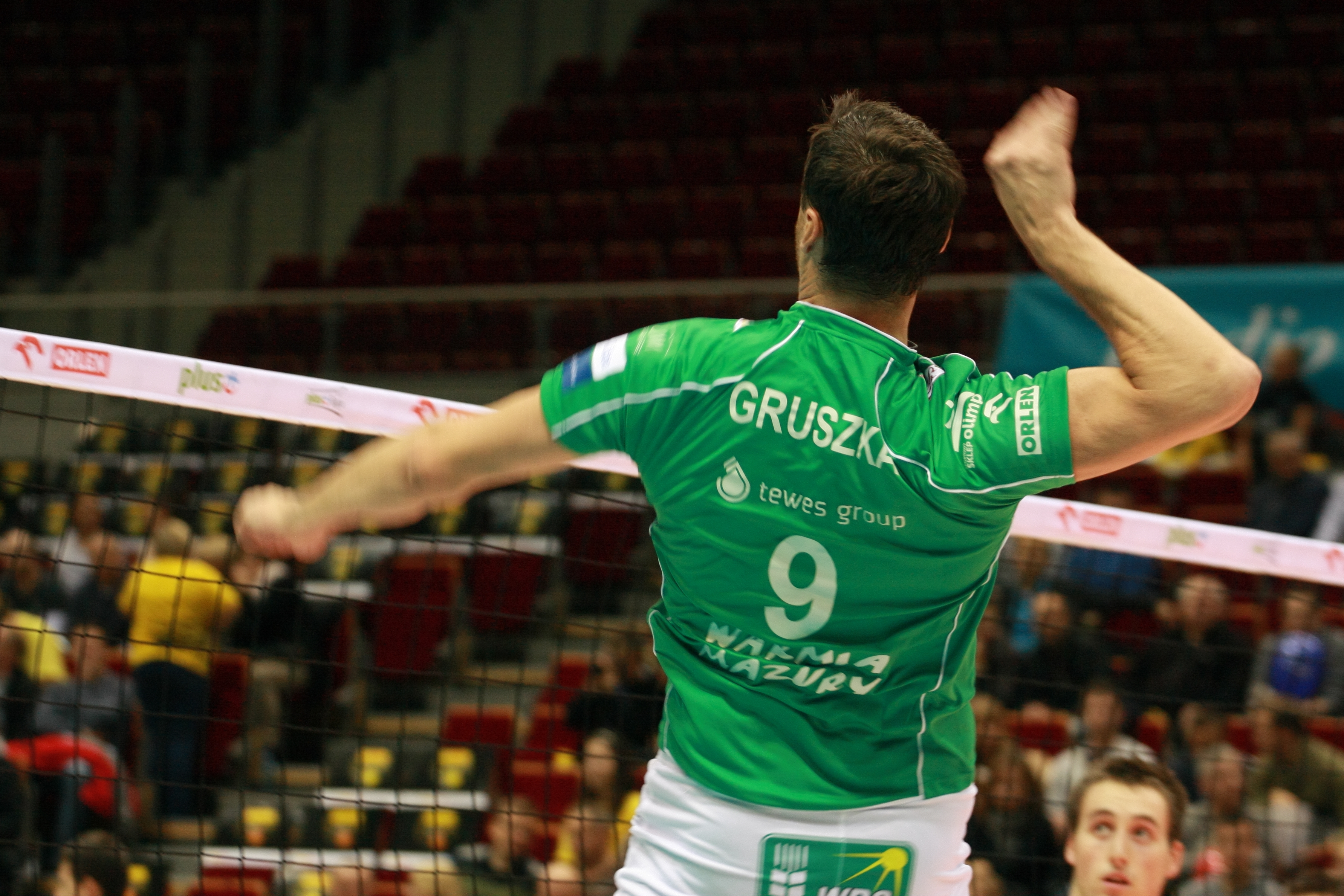 Piotr Gruszka